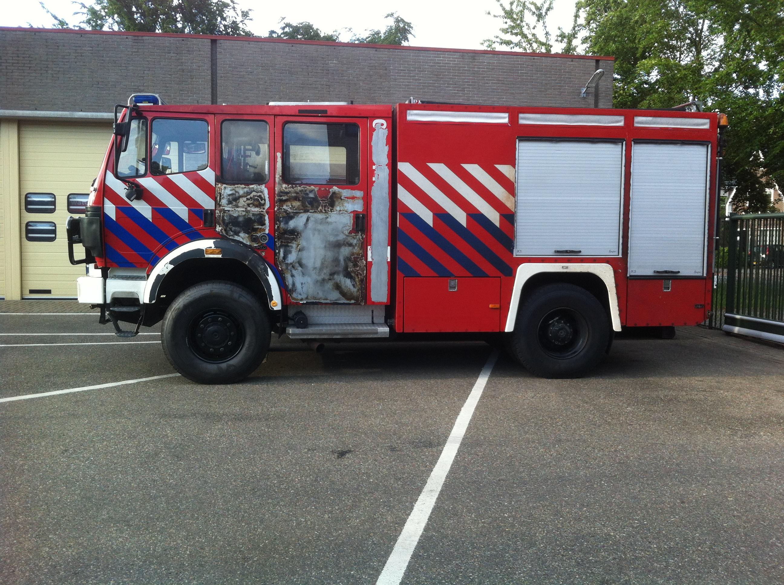 Brandweerwagen van de brandweer in Ede met brandschade die is opgelopen tijdens de branden op de Hoge Veluwe op 20 april 2014